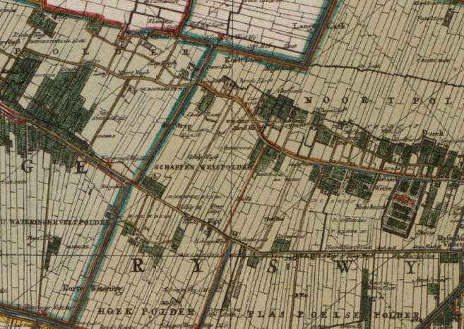 Schapenweipolder, Rijswijk.